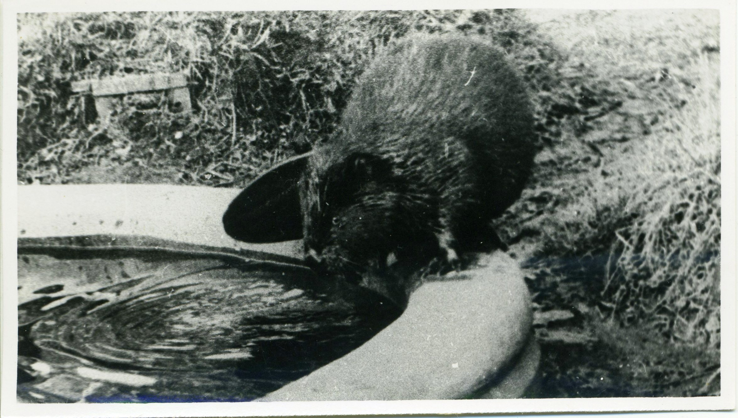 Обыкновенный бобр (Castor fiber) в зоопарке города Гродно, Беларусь. Фото сделано в промежутке между основанием зоопарка (1927) и до начала Второй мировой войны.